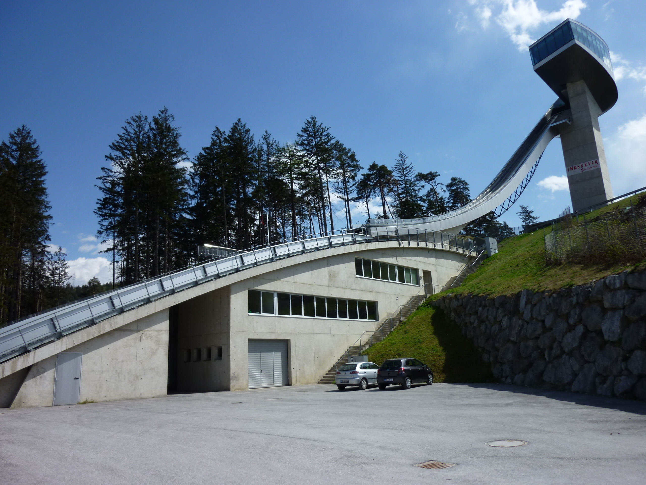 Bergisel